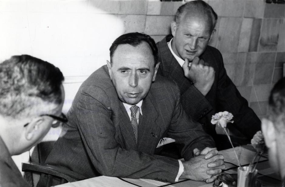 Baal, J. van (ARP). De Gouverneur van Nieuw Guinea dr. J. van Baal op bezoek in Nederland voor besprekingen met minister Helders. Foto: Van Baal tijdens de persconferentie na zijn aankomst op Schiphol. Nederland, Amsterdam, Schiphol, 7 juli 1957.